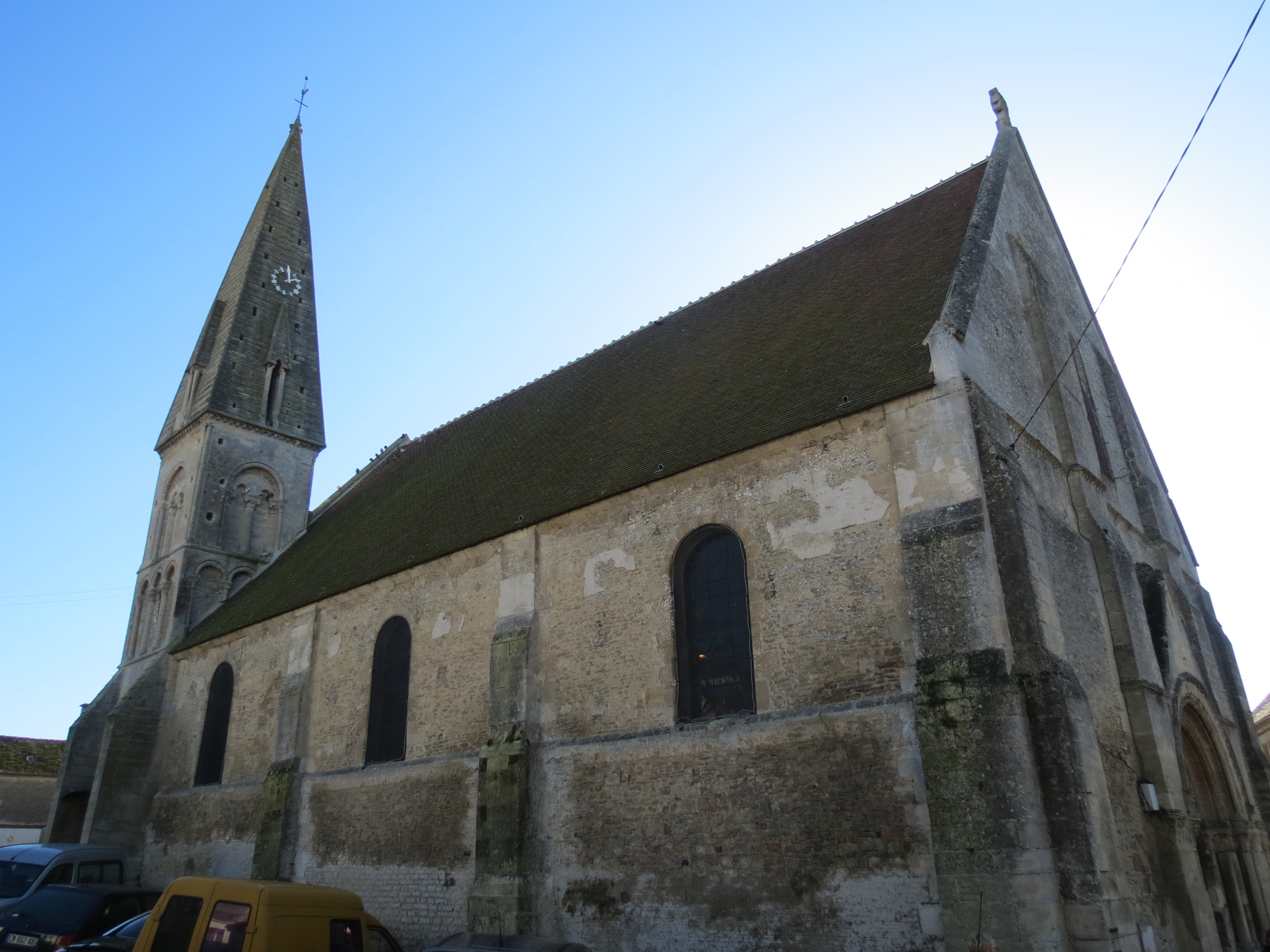 Eglise du Chambois